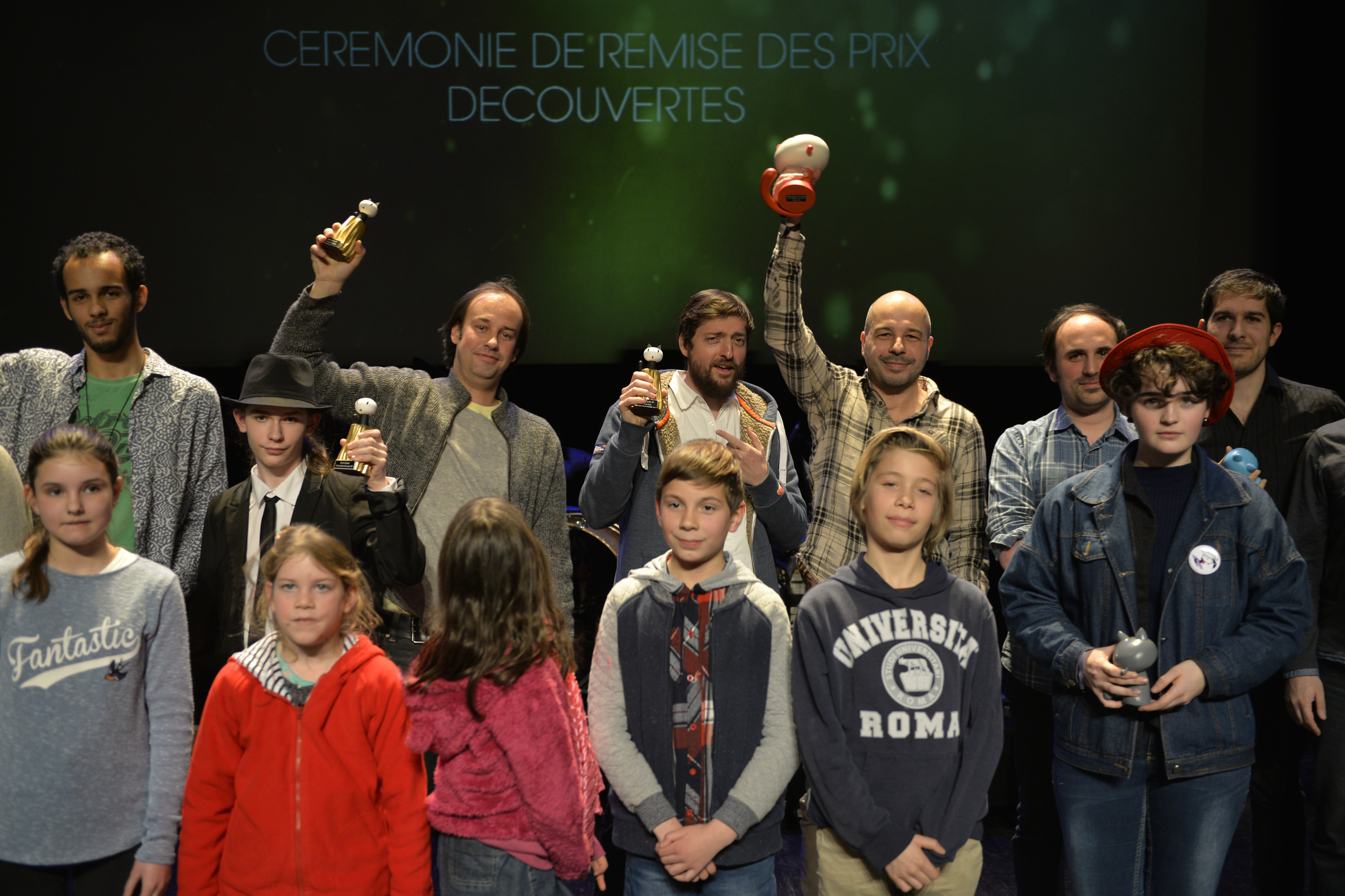 Lauréats des prix Jeunesse au Festival International de la Bande Dessinée d'Angoulême 2017.